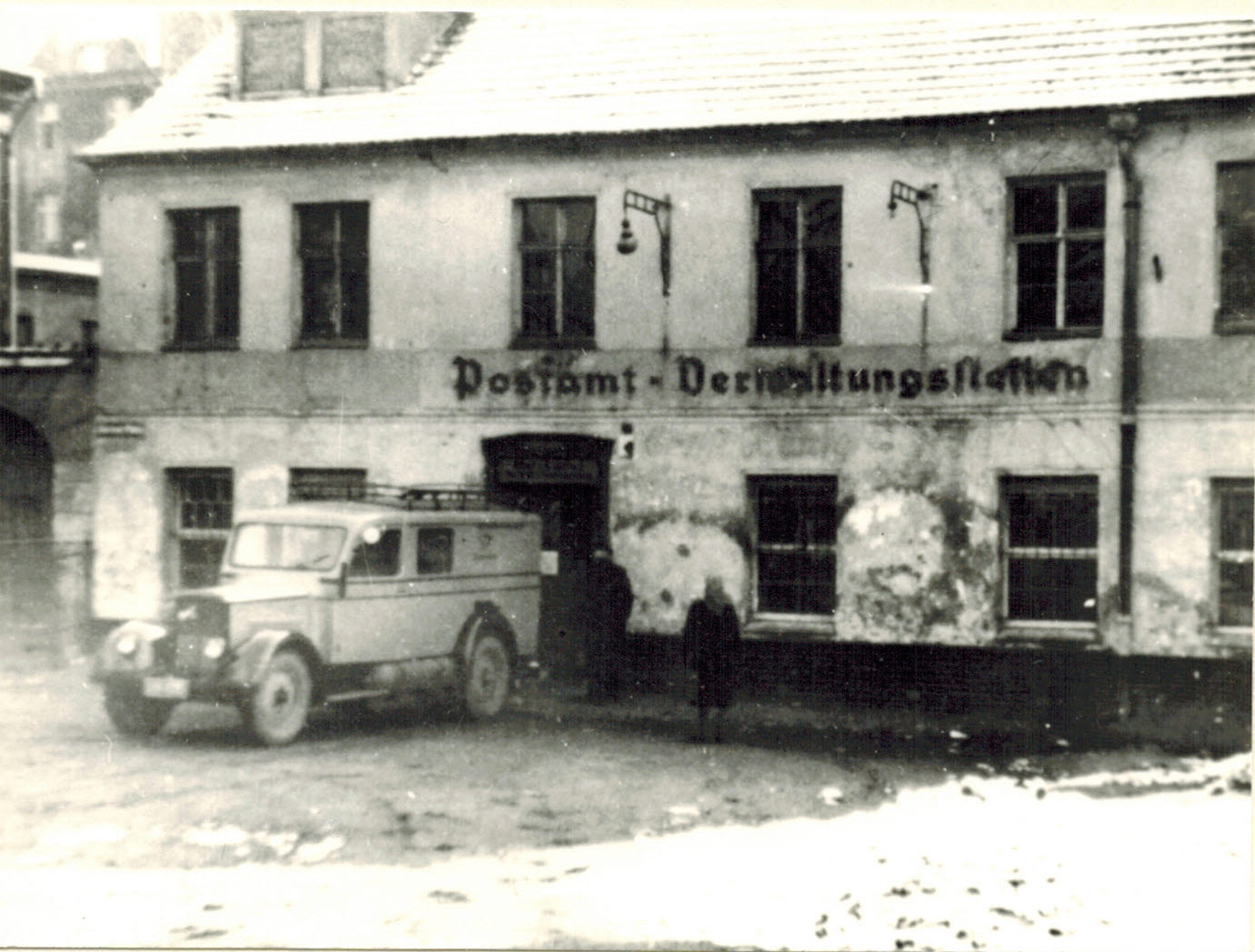 Verwaltungsdienststellen des Postamtes im ehemaligen Gasthof Drei Kronen